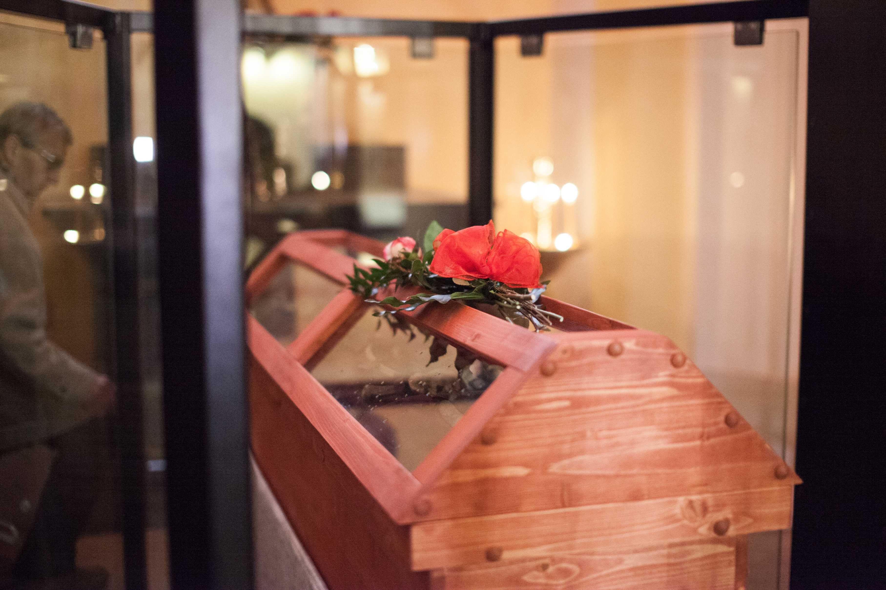 Relikviář s ostatky Sv. Clari v kapli Sv. Clari v chrámu Povýšení sv. Kříže na Zámeckém náměstí v Teplicích.